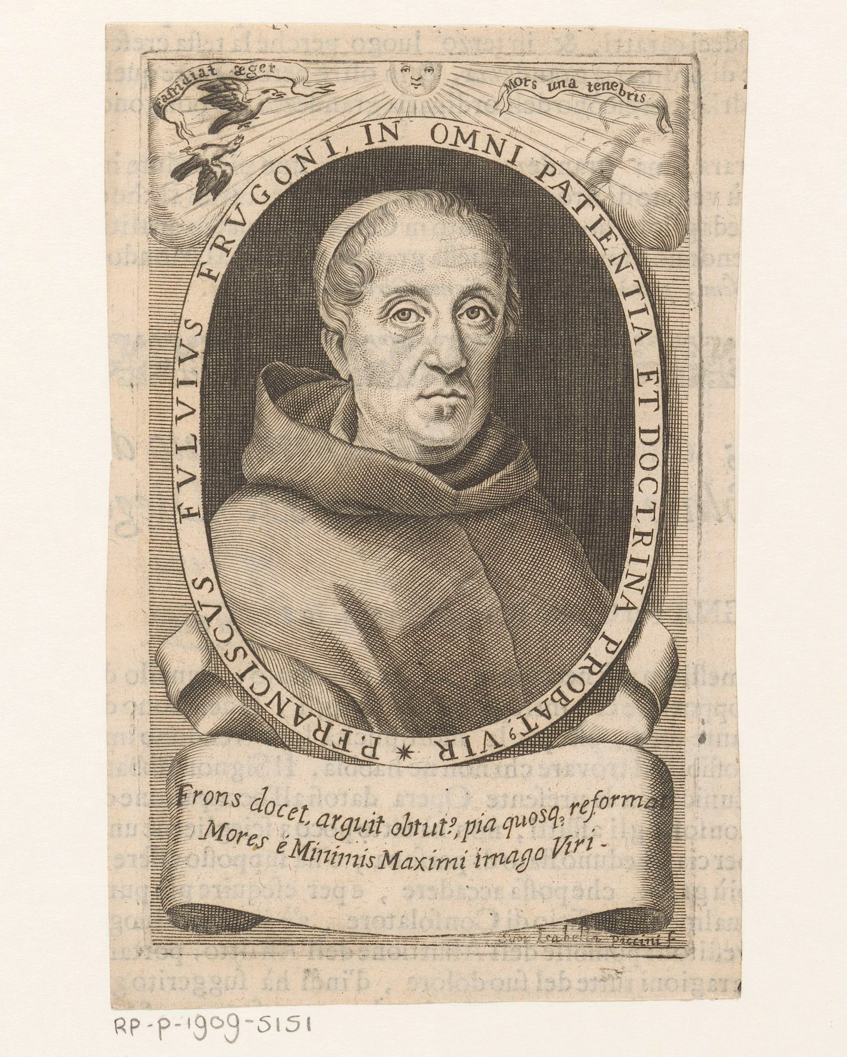 IdentificatieTitel(s): Portret van theoloog en schrijver Francesco Fulvio FrugoniObjecttype: prent boekillustratie Objectnummer: RP-P-1909-5151Opschriften / Merken: verzamelaarsmerk, verso, gestempeld: Lugt 2228VervaardigingVervaardiger: prentmaker: Isabella Piccini (vermeld op object)Plaats vervaardiging: VenetiëDatering: 1654 - 1734Fysieke kenmerken: gravure; verso met tekst in boekdrukMateriaal: papier Techniek: graveren (drukprocedé) / boekdrukAfmetingen: plaatrand: h 145 mm × b 88 mmOnderwerpWat: historical personsportrait of a writerWie: Francesco Fulvio FrugoniVerwerving en rechtenVerwerving: aankoop 1905Copyright: Publiek domein